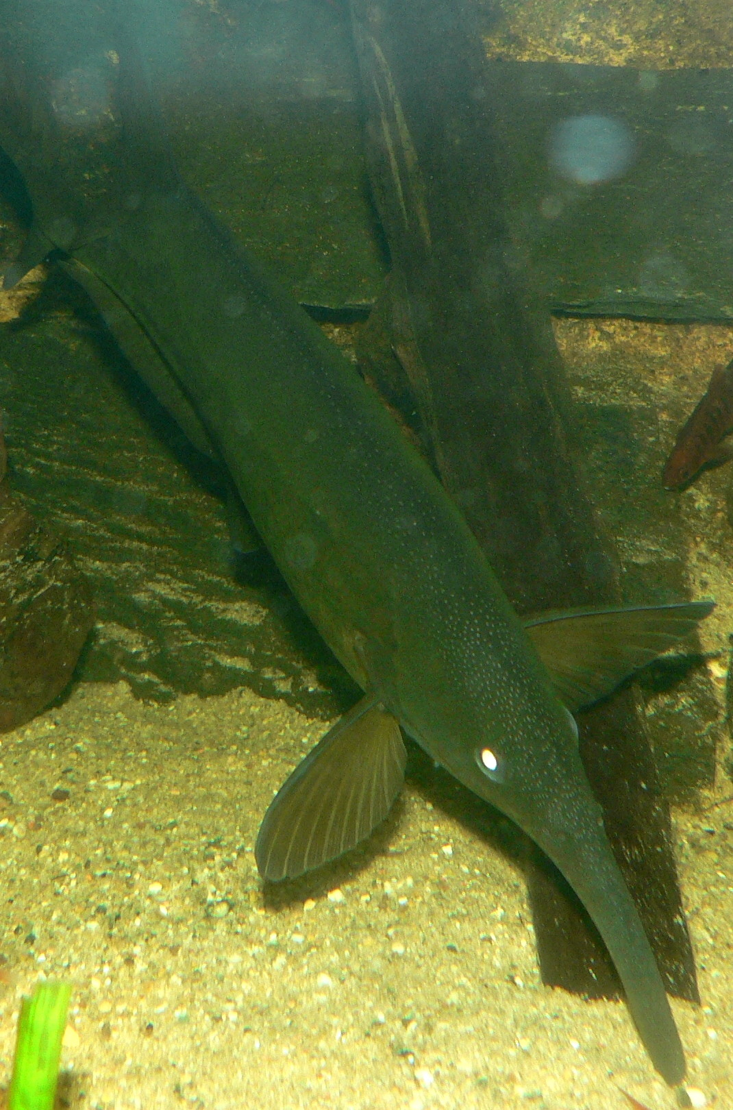 Campylomormyrus numenius Front